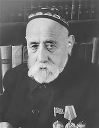 Памятник писателям М. Горькому и С. Айни Душанбе, 2015 год Тоҷикӣ: Садриддин Айнӣ ва Максим Горкий пайкараҳои асосгузорони адабиёти шӯравӣ, назди бинои Иттифоқи нависандагони Тоҷикистон, ш. Душанбе, соли 2015